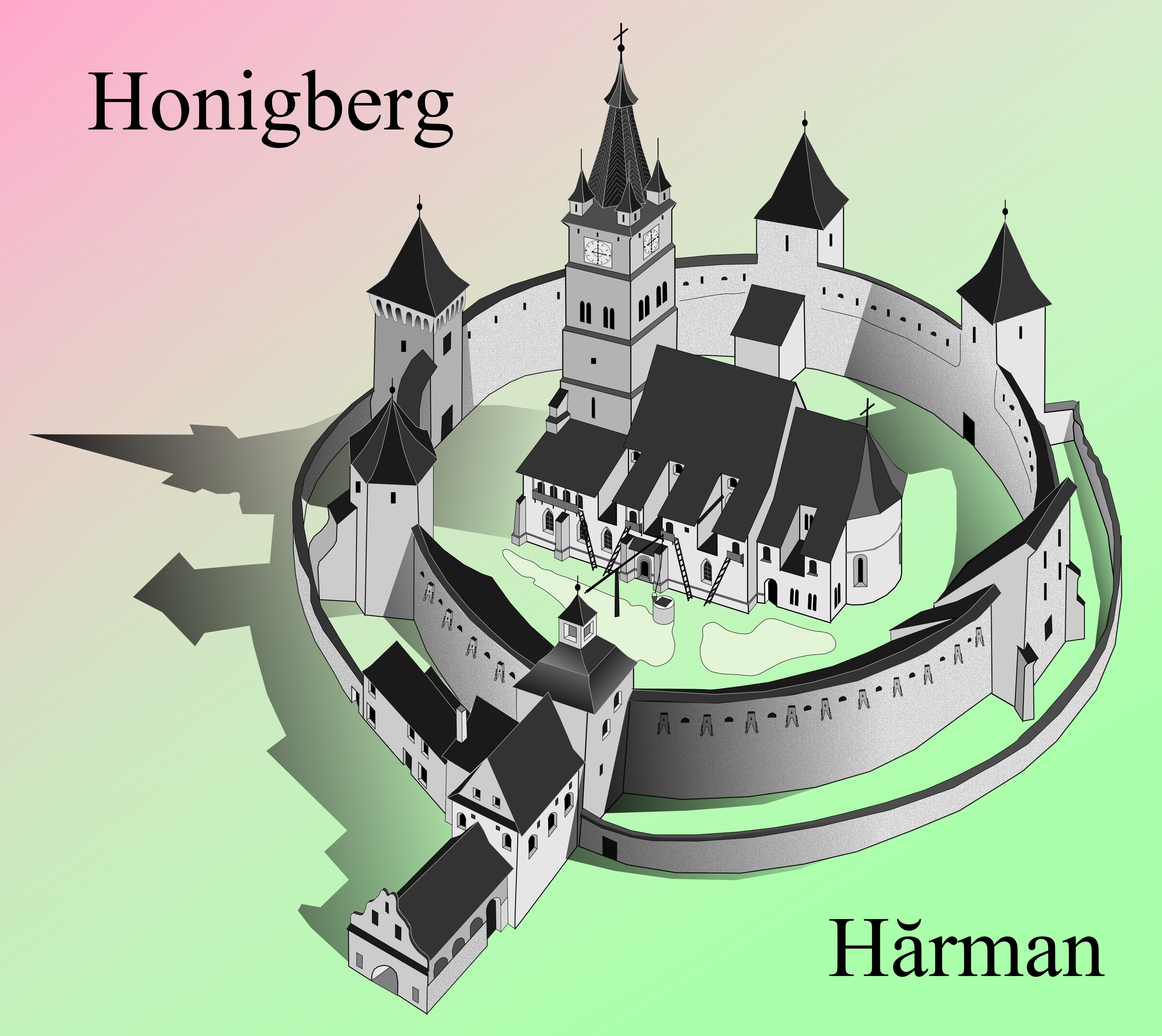 Biserica fortificata din Harman.